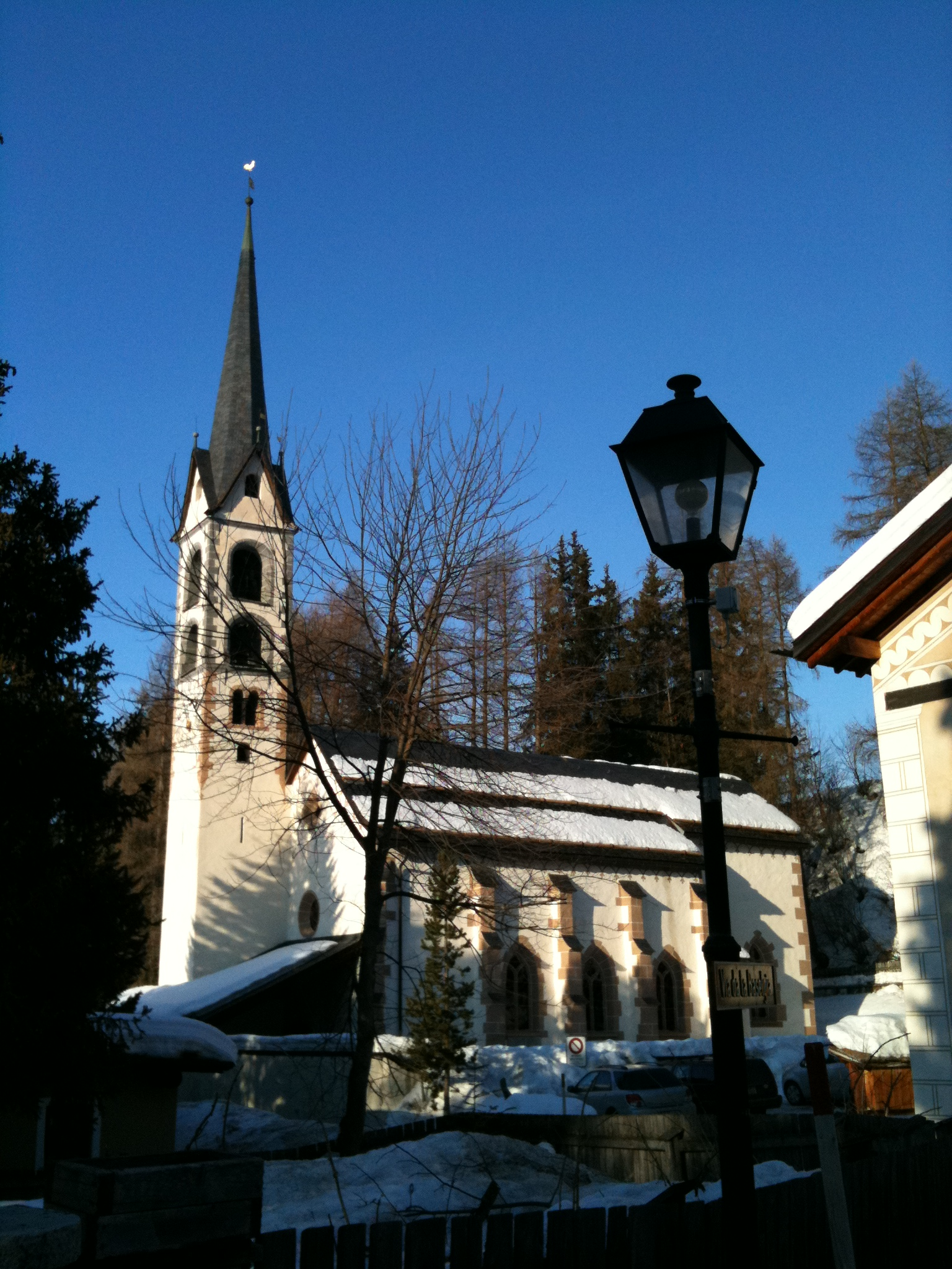 Kirche Chamues-ch, Kanton Graubünden